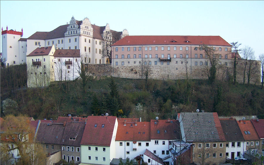 Ortenburg Bautzen, Blick vom Proitschenberg